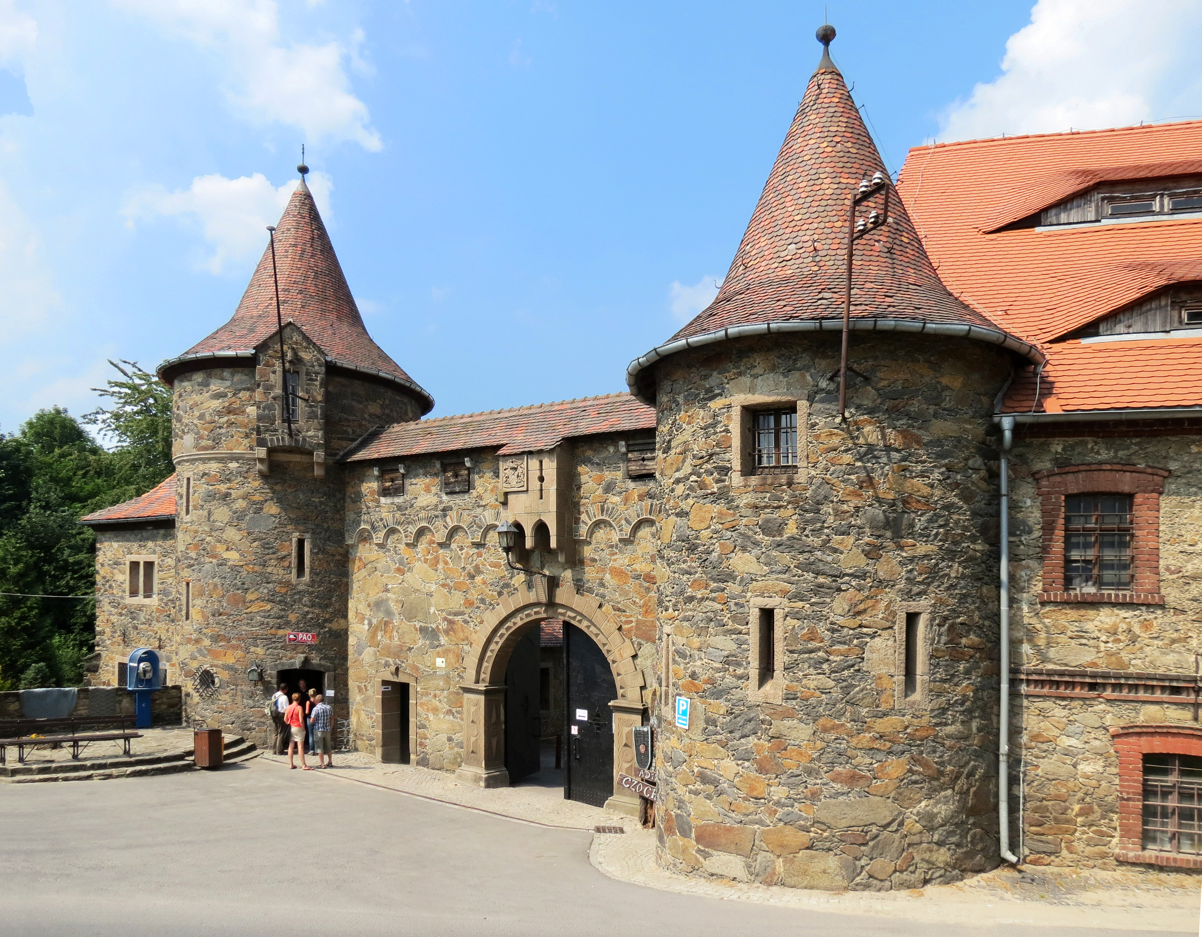 Sucha, spichrz, XVIII